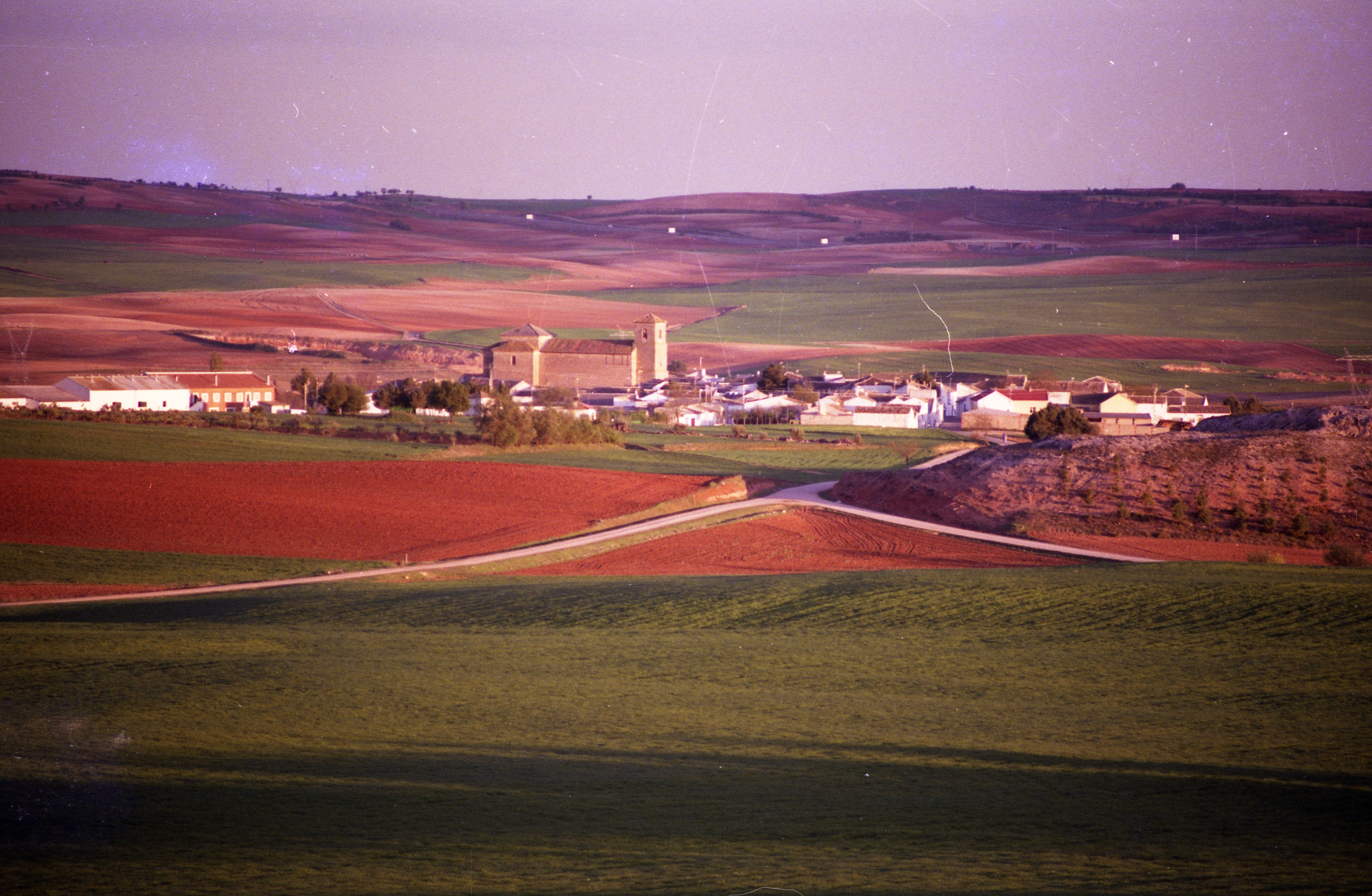 Vista Tribaldos desde la ermita de Santa Ana